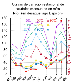 Curvas de variación estacional de caudales mensuales del río Espolón a la salida del lago Espolón. # Dirección General de Aguas # ANÁLISIS DE METODOLOGÍA Y DETERMINACIÓN DE CAUDALES DE RESERVA TURÍSTICOS. Informe Final # Ministerio de Obras Públicas (Chile) # url : # 2010 # CUADRO 6.3-9 CAUDALES MEDIOS MENSUALES EN ESTACIÓN FLUVIOMÉTRICA RÍO ESPOLÓN EN DESAGÜE LAGO ESPOLÓN pág. 189 mes 5% 10% 20% 50% 85% 90% 95% ene 100.5 88.9 78.1 64.4 55.0 53.6 52.0 feb 88.8 68.3 52.9 37.9 31.3 30.7 30.2 mar 76.6 63.0 51.5 38.5 31.1 30.1 29.0 abr 123.5 107.8 89.8 58.9 26.6 19.8 10.4 may 162.1 128.4 96.6 55.5 27.7 23.4 18.3 jun 164.7 149.0 129.8 92.6 45.8 34.6 17.8 jul 167.9 134.0 103.6 66.4 41.7 37.8 33.0 ago 119.8 100.8 81.4 53.2 30.5 26.6 21.6 sep 61.6 58.5 54.6 47.2 38.2 36.0 32.8 oct 151.4 115.2 87.8 60.9 48.3 46.9 45.6 nov 169.8 135.2 105.3 70.3 48.3 45.0 40.9 dic 113.7 101.3 89.6 74.2 63.2 61.4 59.3